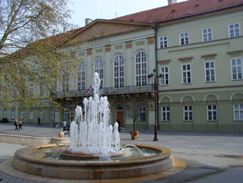 A kaposvári Rippl-Rónai Múzeum. A volt vármegyeháza klasszicista épülete 1828 – 1832 között Török Ferenc tervei alapján épült